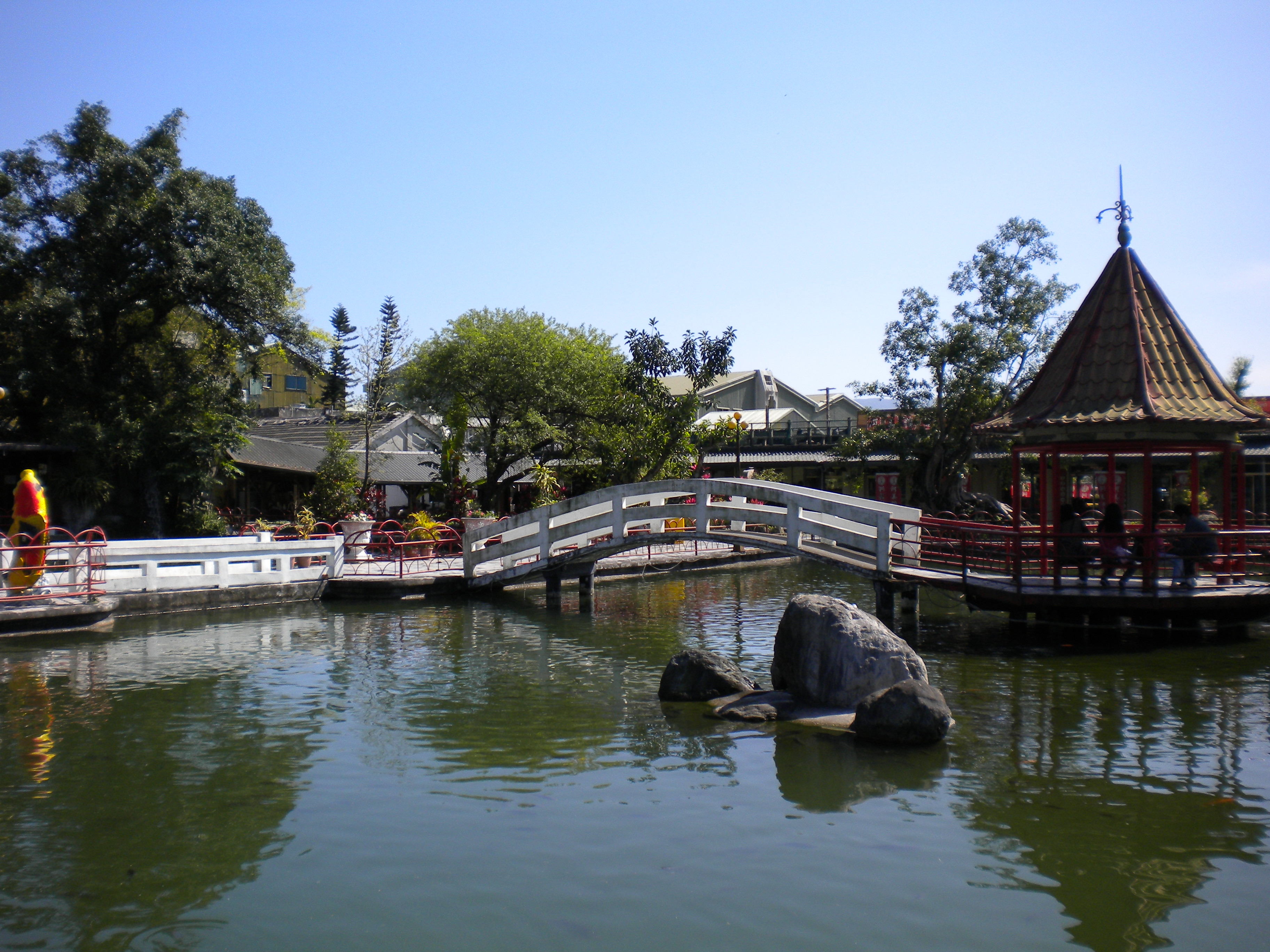 花蓮縣光復鄉糖廠